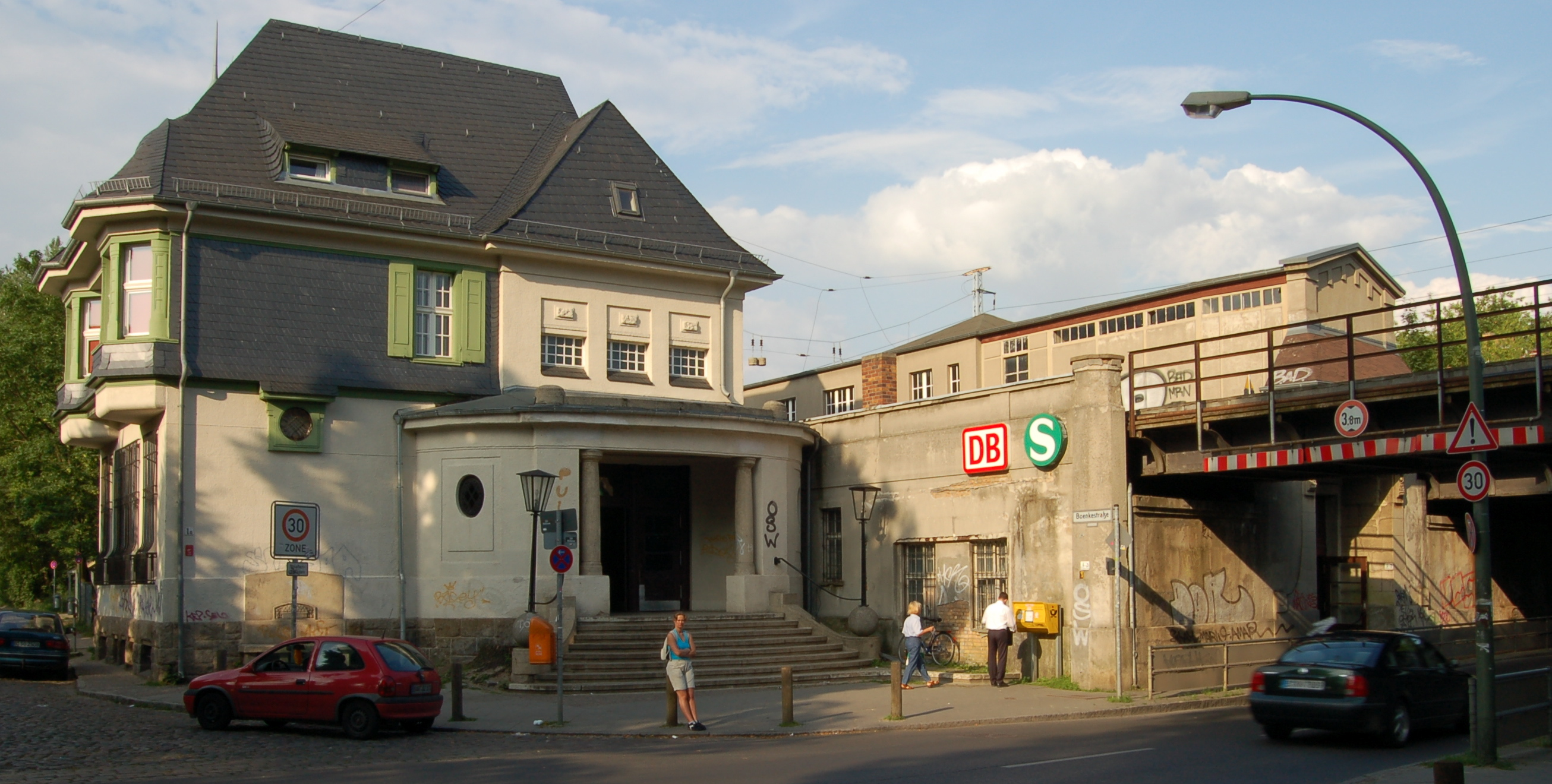 Das Bild zeigt das Bahnhofsgebäude in Berlin-Karow. Es wurde von mir am 20. Juni 2006 mit einer Nikon D50 und einem Nikkor 15-55mm Objektiv photographiert. Ich veröffentliche es unter den Bedingungen der GNU-Lizenz für freie Dokumentation.